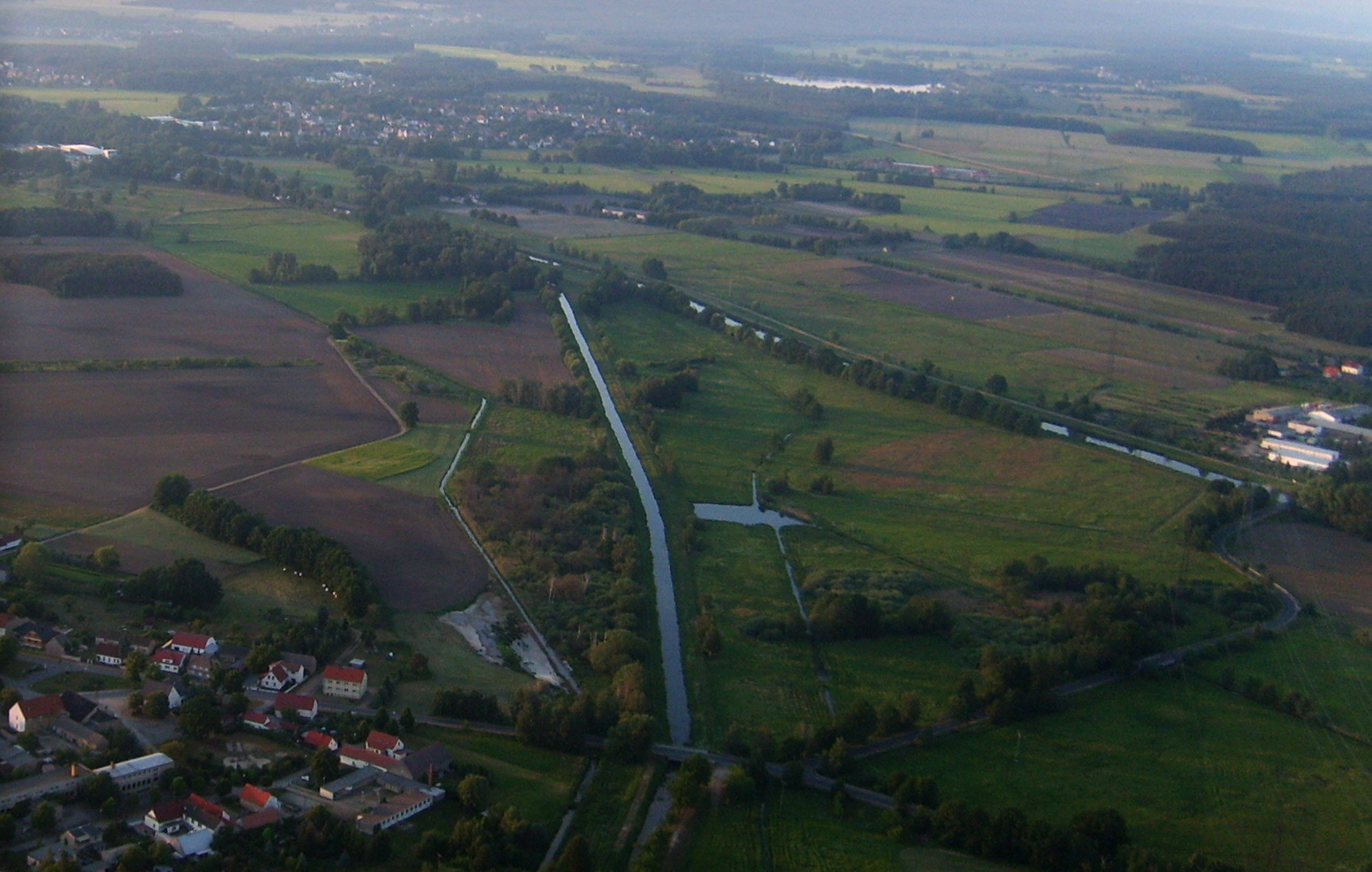 Die Mündung der Kleinen Röder bei Zoberdorf aus der Luft betrachtet.